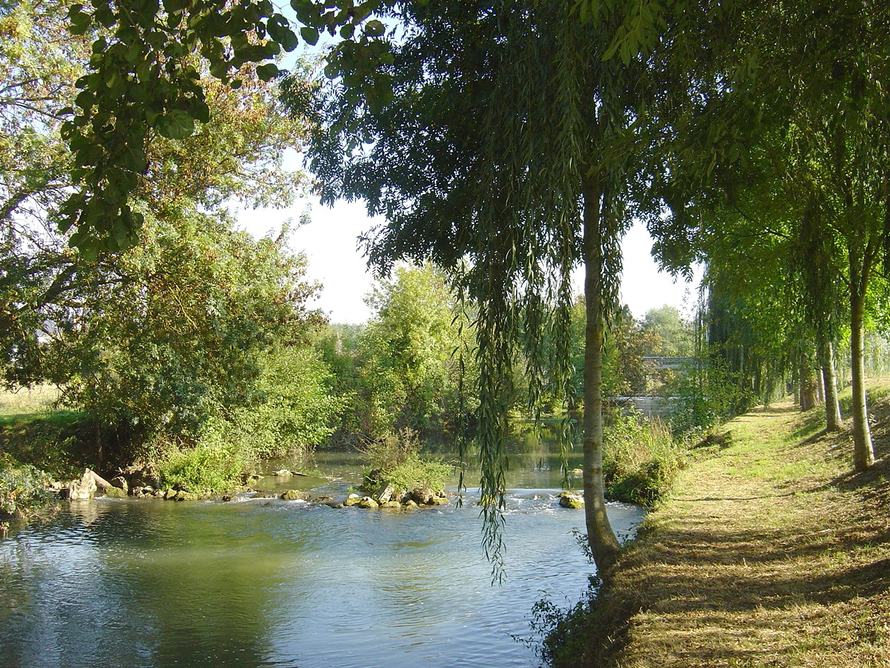 Rives de la Cisse à Limeray - Indre et Loire - France